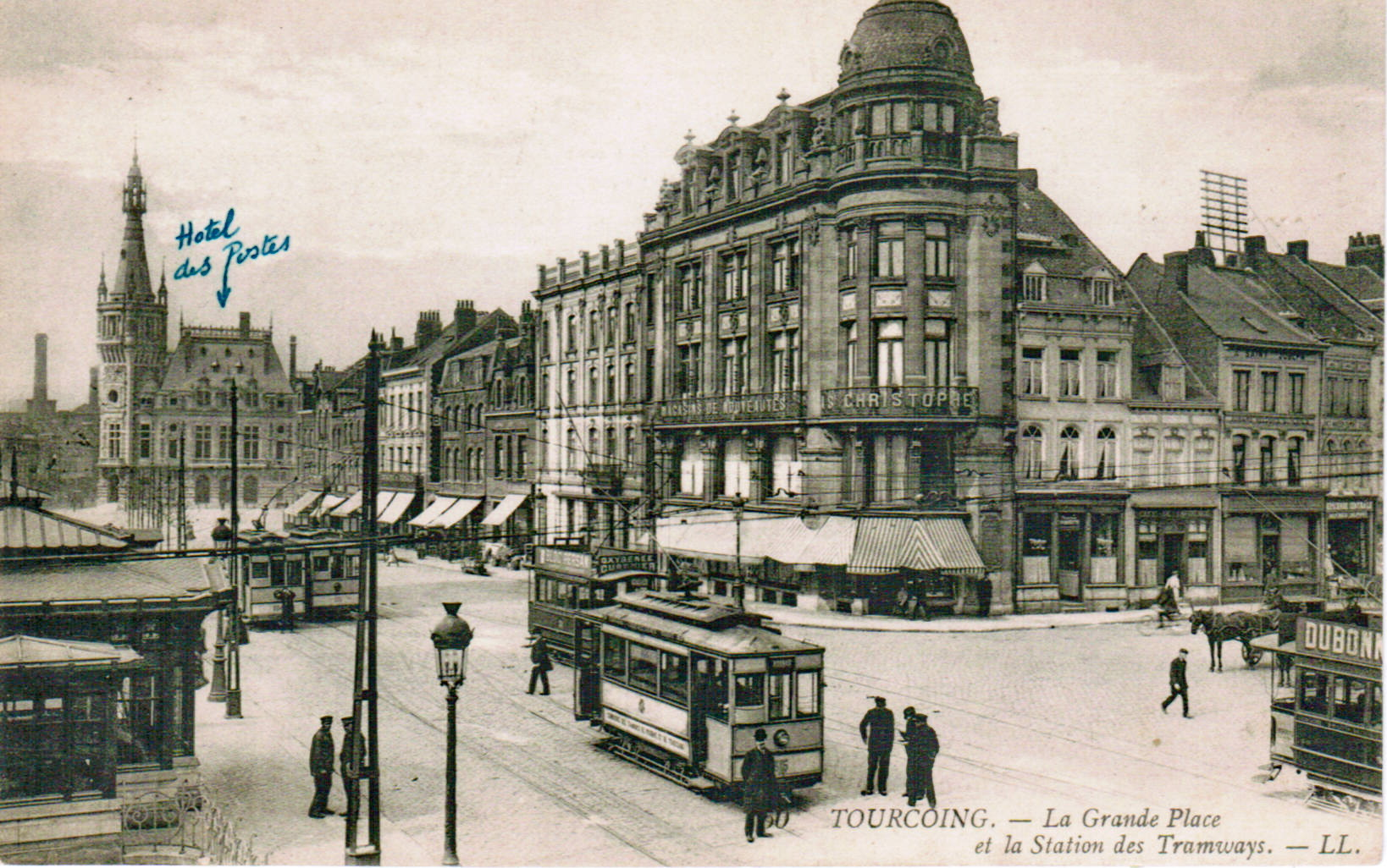 Carte postale ancienne éditée par LL n°50TOURCOING - La Grande Place et la Station des Tramways